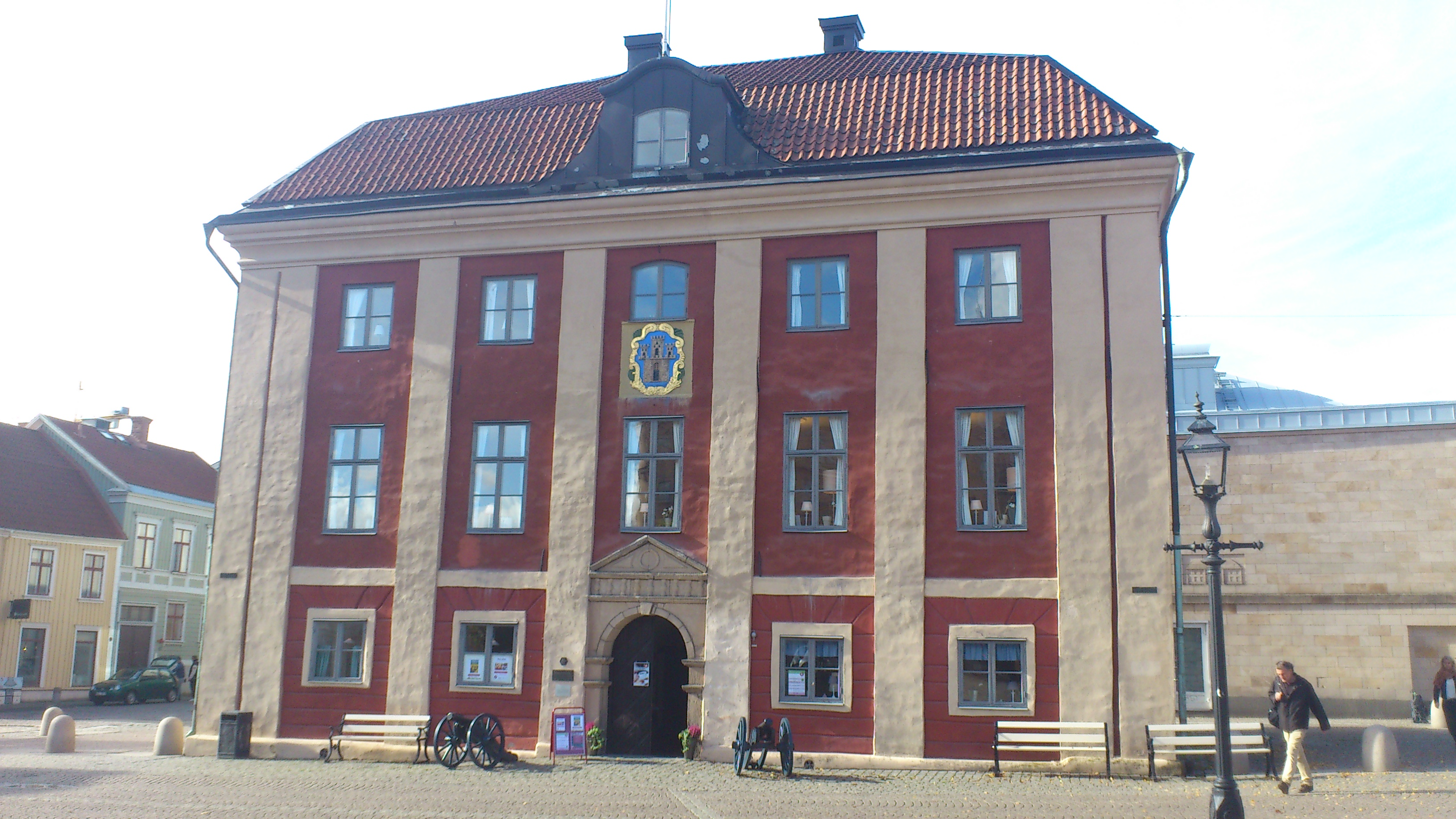 Gamla Rådhuset, Jönköping (Antiken 1)